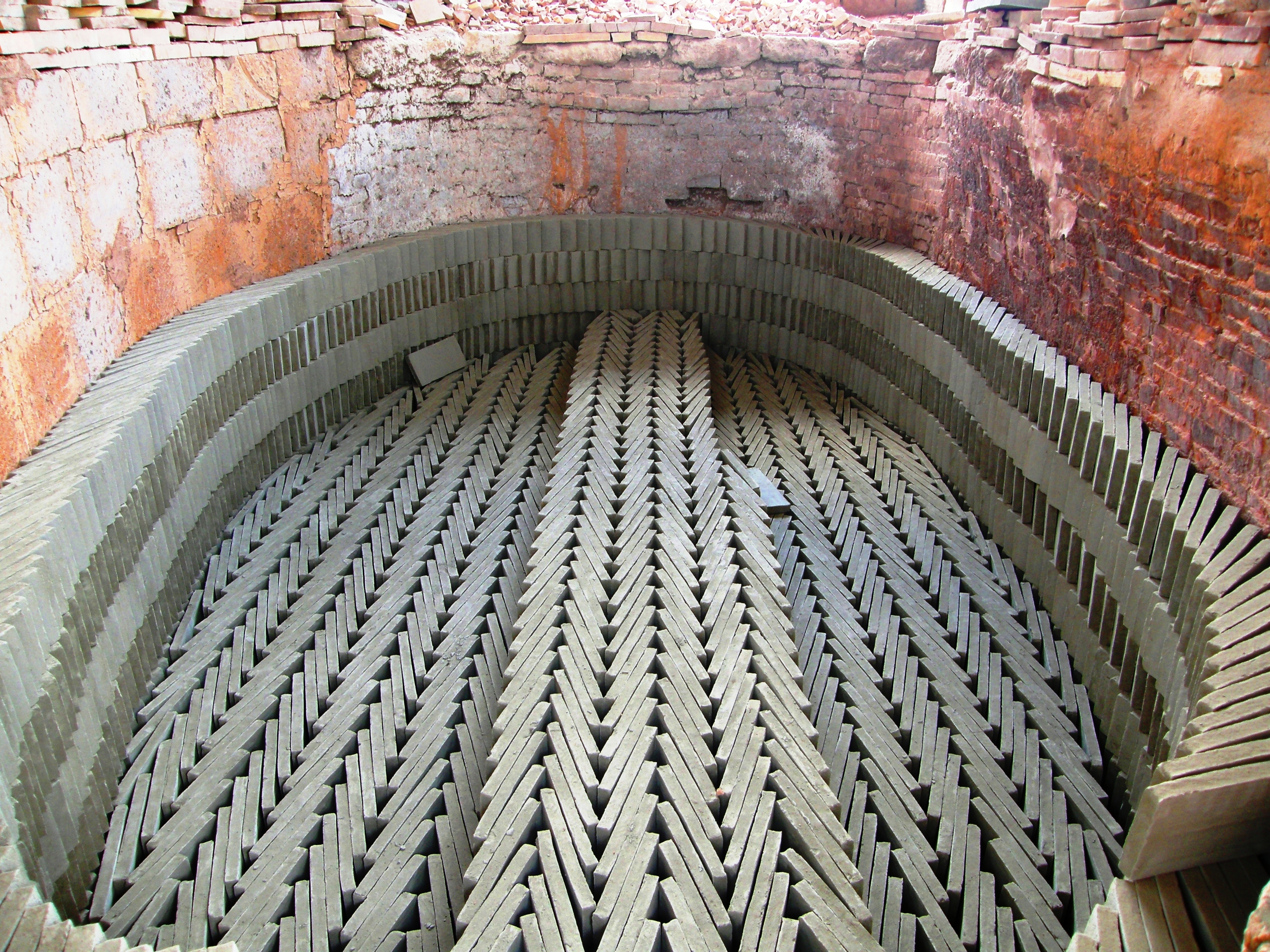 Infornatura del cotto nell'antica Fornace Stefani, Castel Viscardo- Italia